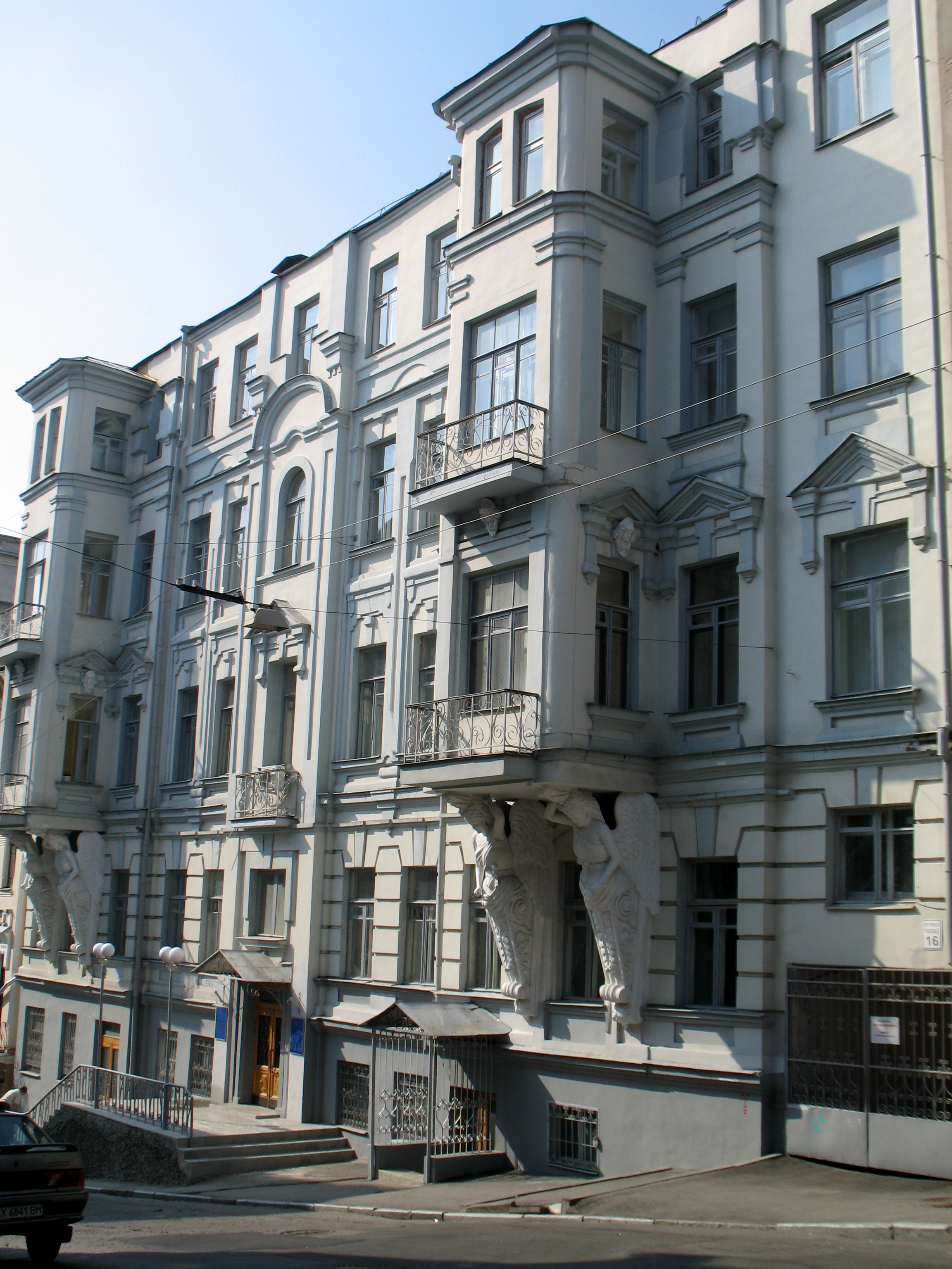 Харківська Національна академія міського господарства